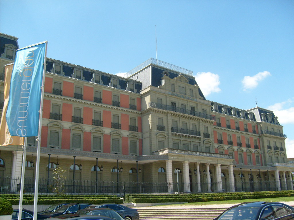 Palais Wilson à Genève (Suisse)